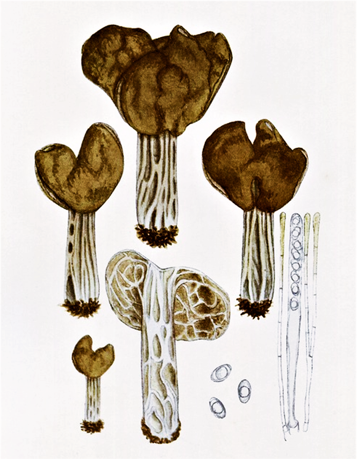 Giacomo Bresadola: Helvella fusca Gillet (1879)